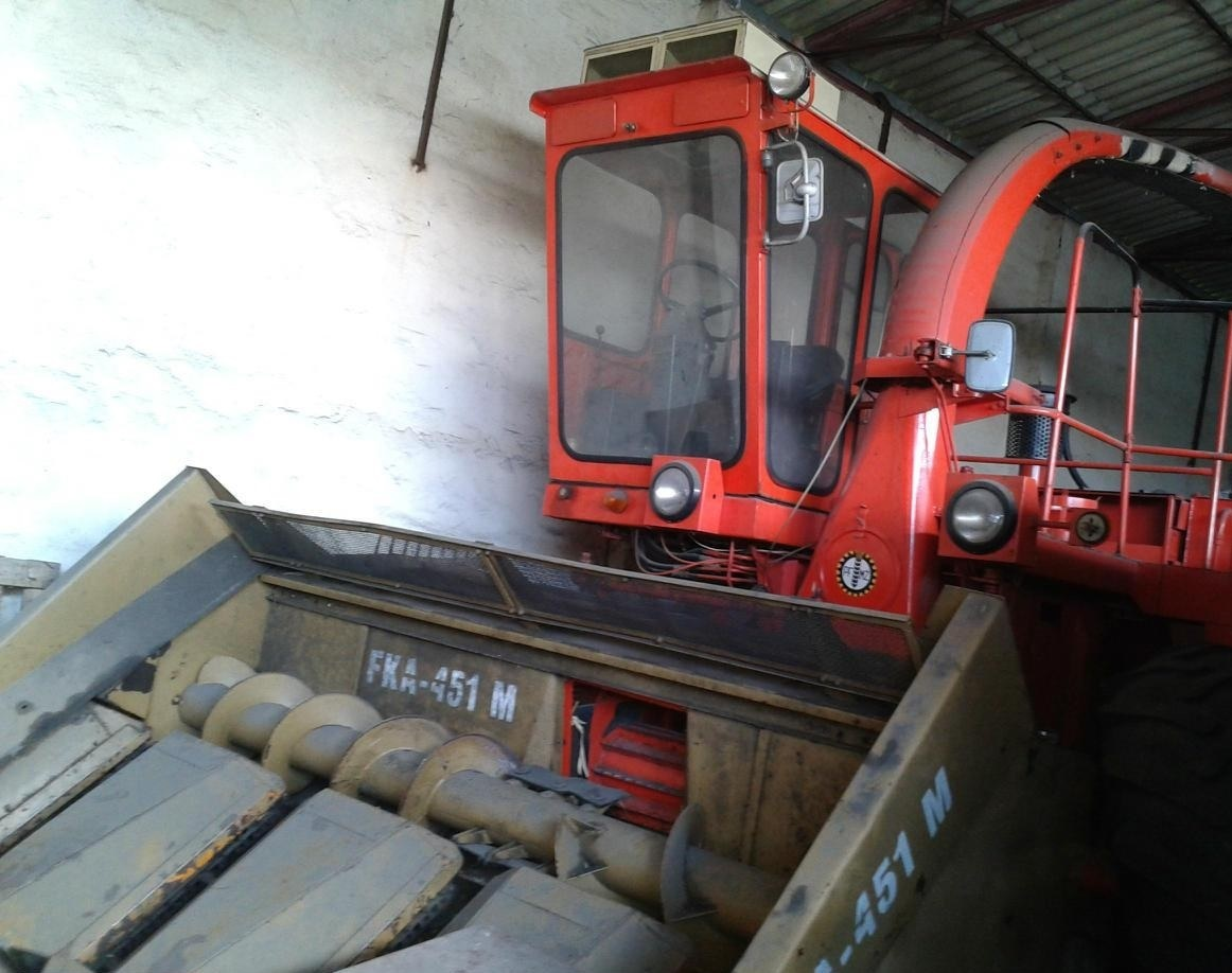 widok z przodu